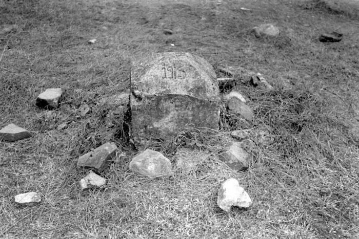 Negatief. Een markeringssteen op Timor bij de grens van Nederlands-Indië met de Portugese enclave Oeikoesi